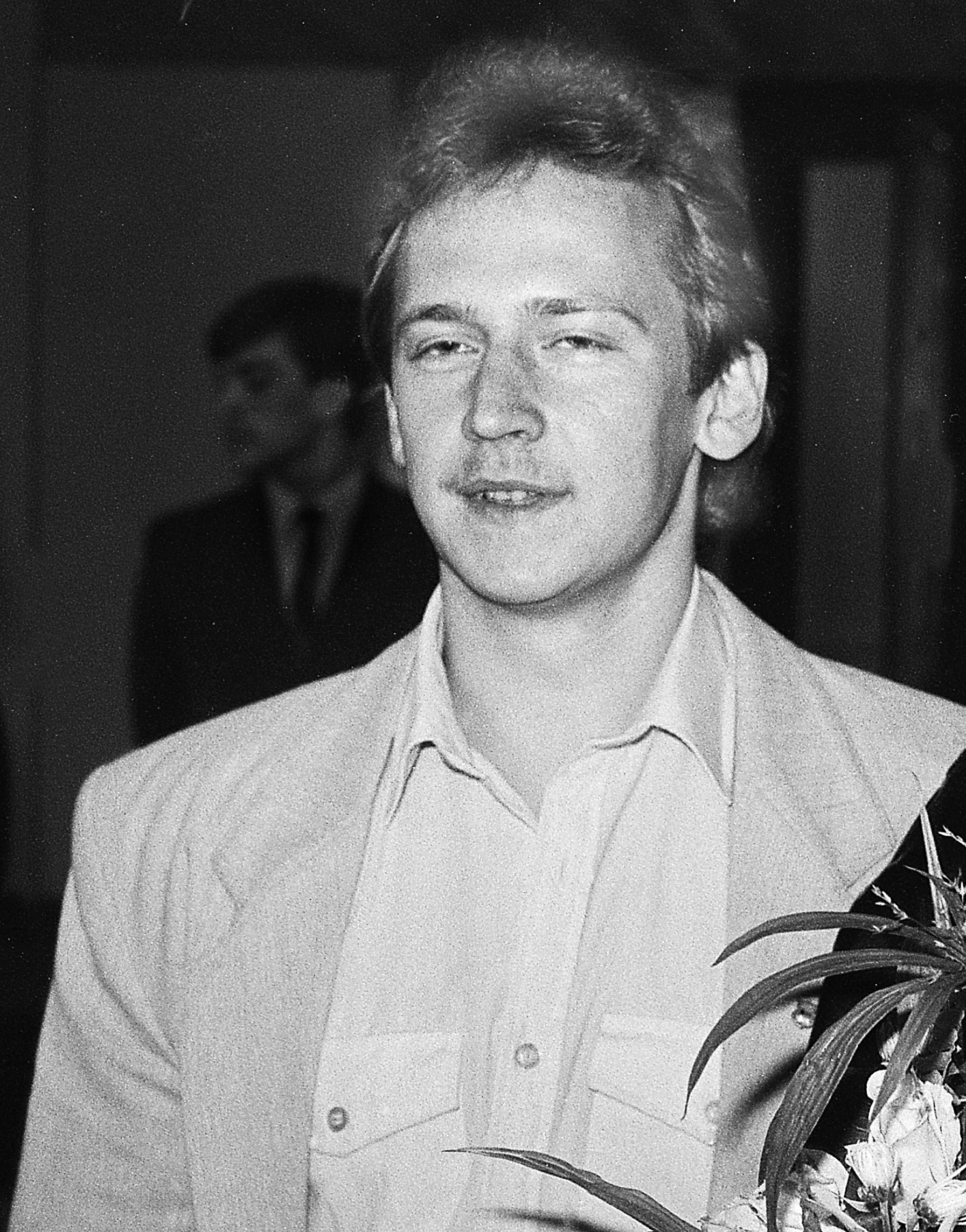 Vahur Kersna